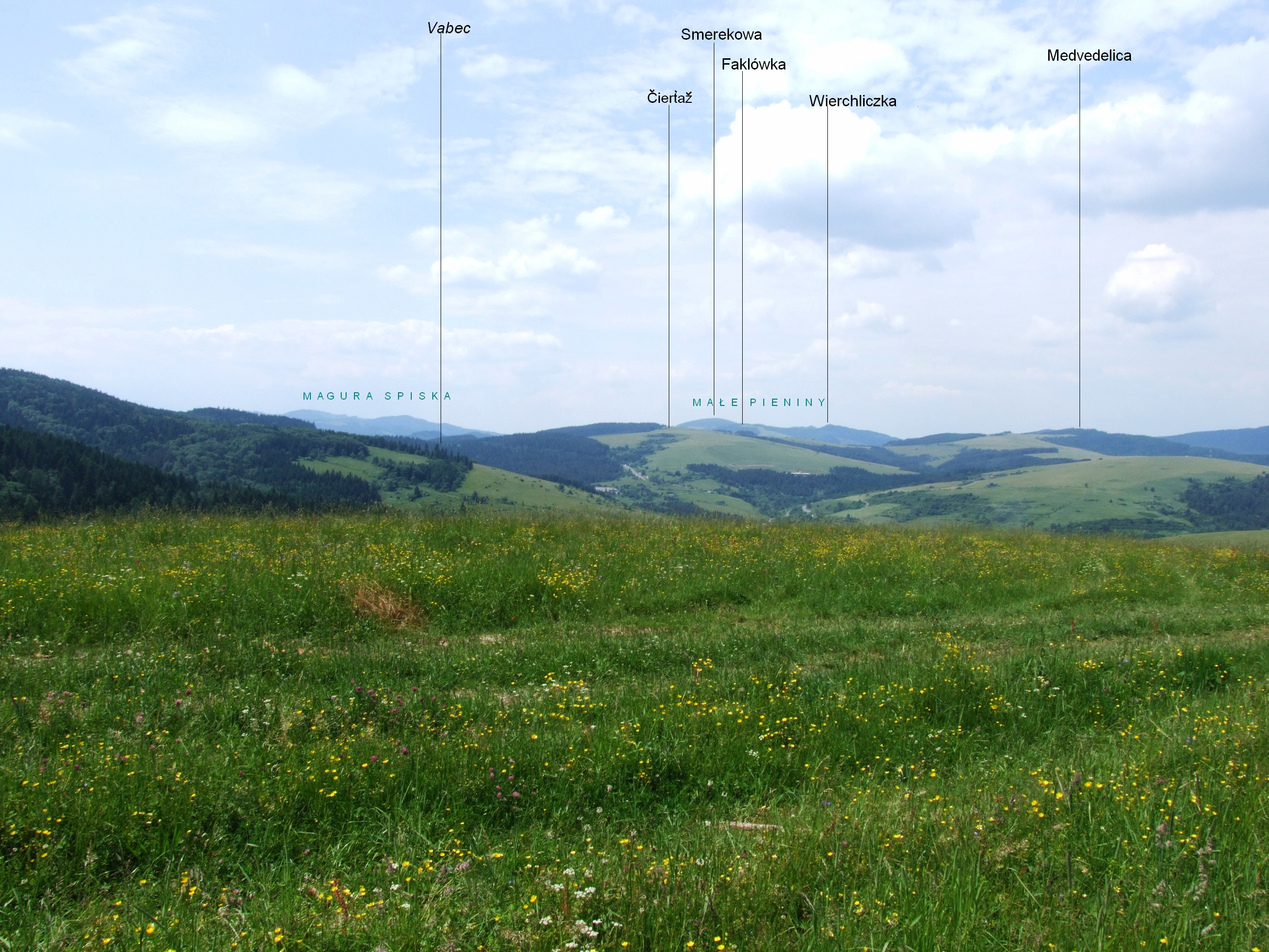 Widok z wzniesienia Kóta (poniżej Oślego wierchu)